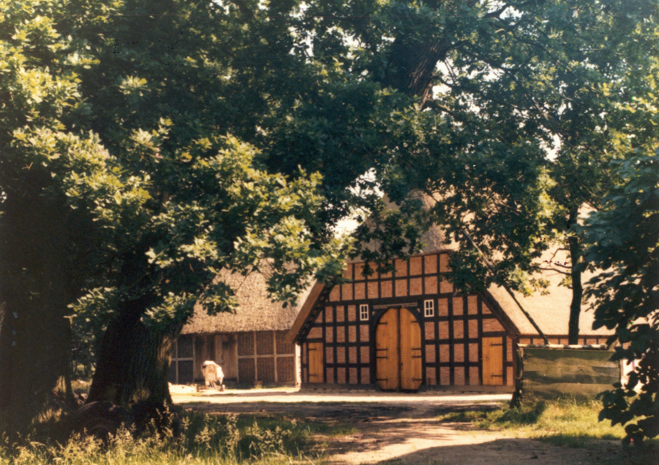 Freilichtmuseum Frelsdorfer Brink in 27616 Frelsdorf, Landkreis Cuxhaven, Niedersachsen, Deutschland.